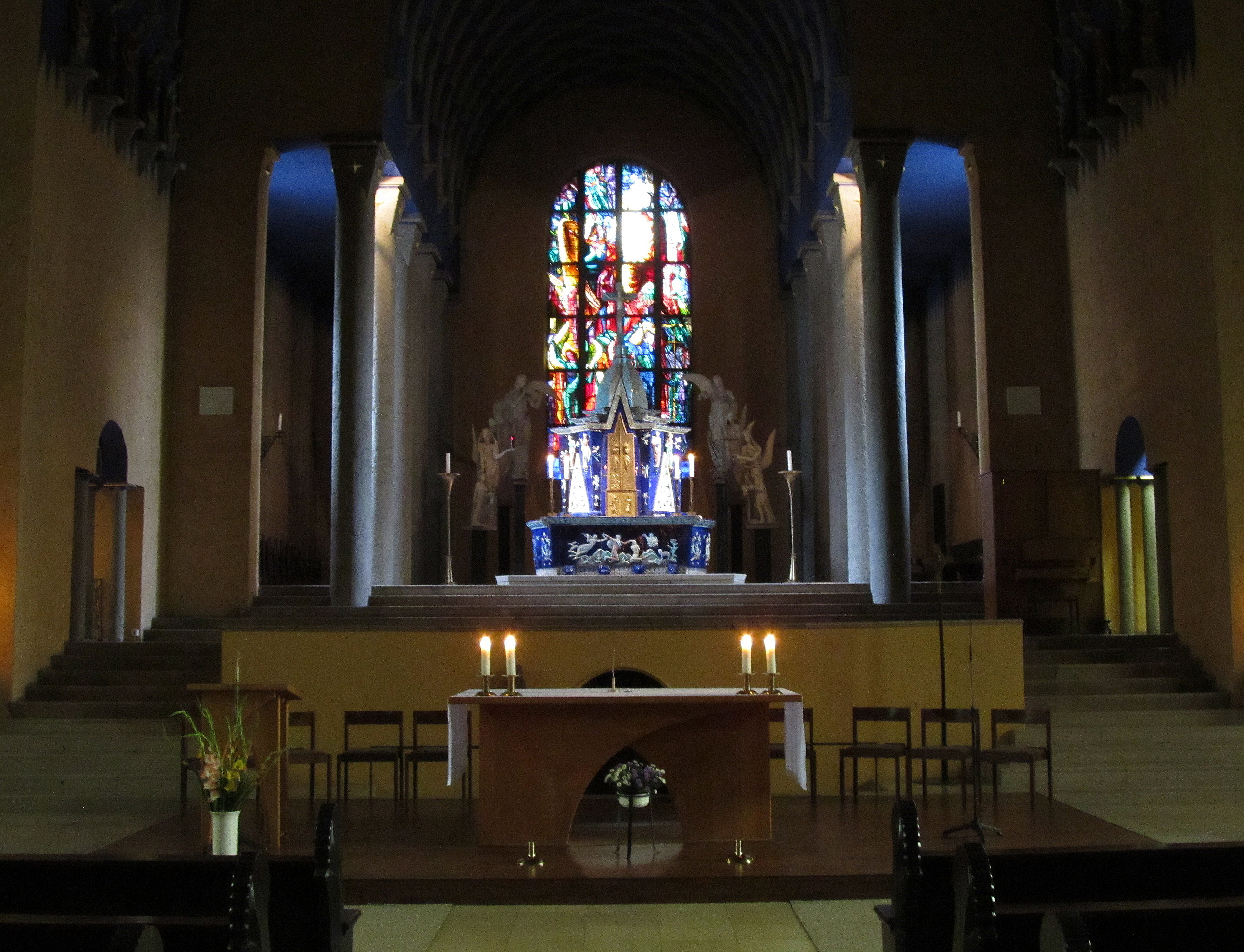 Altarraum der katholischen Kirche St. Michael in Saarbrücken, Saarland